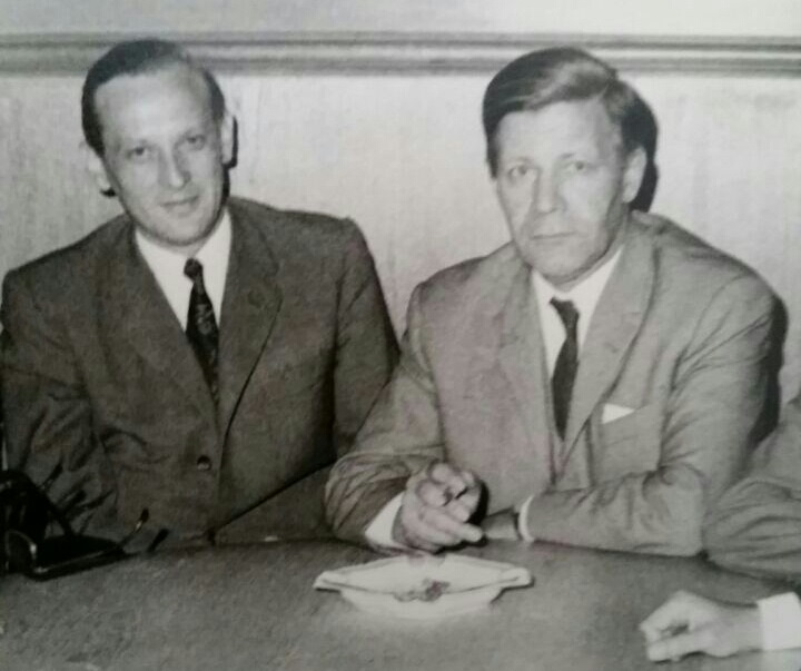 Werner Hesse (* 1929 + 2014), SPD-Politiker, Stadtdirektor von Northeim, stellv. Bürgermeister Helmut Schmidt (* 1918), SPD-Politiker, Bundeskanzler